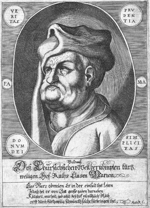 Bildnuß Deß Chursächsischen weitberümpten kurtzweiligen Hof-Raths Clasen Narren Hofnarr des Kurfürsten Johann Friedrich von Sachsen (1468-1532)